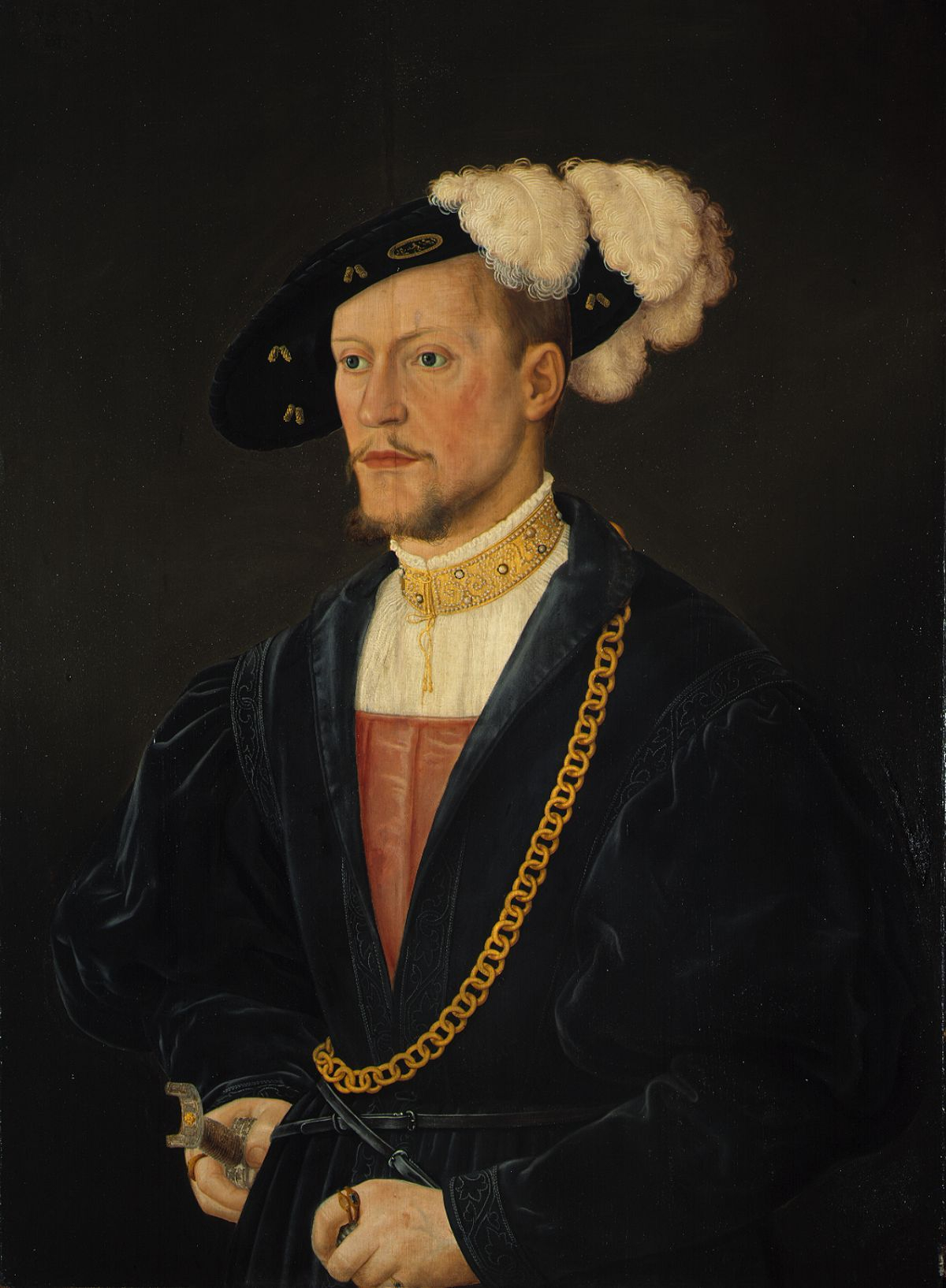 Bildnis des Pfalzgrafen Philipp des Streitbaren